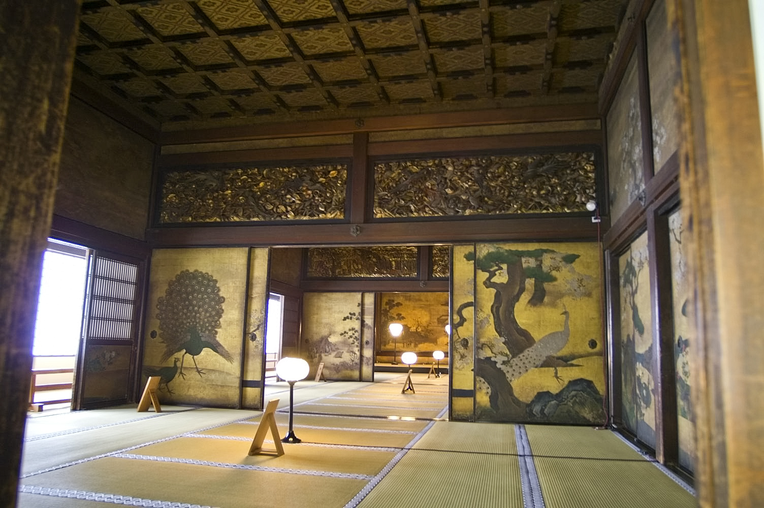 本願寺白書院(国宝) 「三の間(孔雀の間・能舞台)」から「一の間(紫明の間)」を望む。 白書院は対面所「鴻の間」の北裏にある賓客を迎える正式の書院。三の間(孔雀の間)は畳を取り除くと能舞台になるよう工夫されています。 (2005/11/26 Hongwanji Temple, Kyoto, JAPAN) /* UNESCO World Heritage */ Historic Monuments of Ancient Kyoto (Kyoto, Uji and Otsu Cities) (1994) 世界遺産「古都京都の文化財」